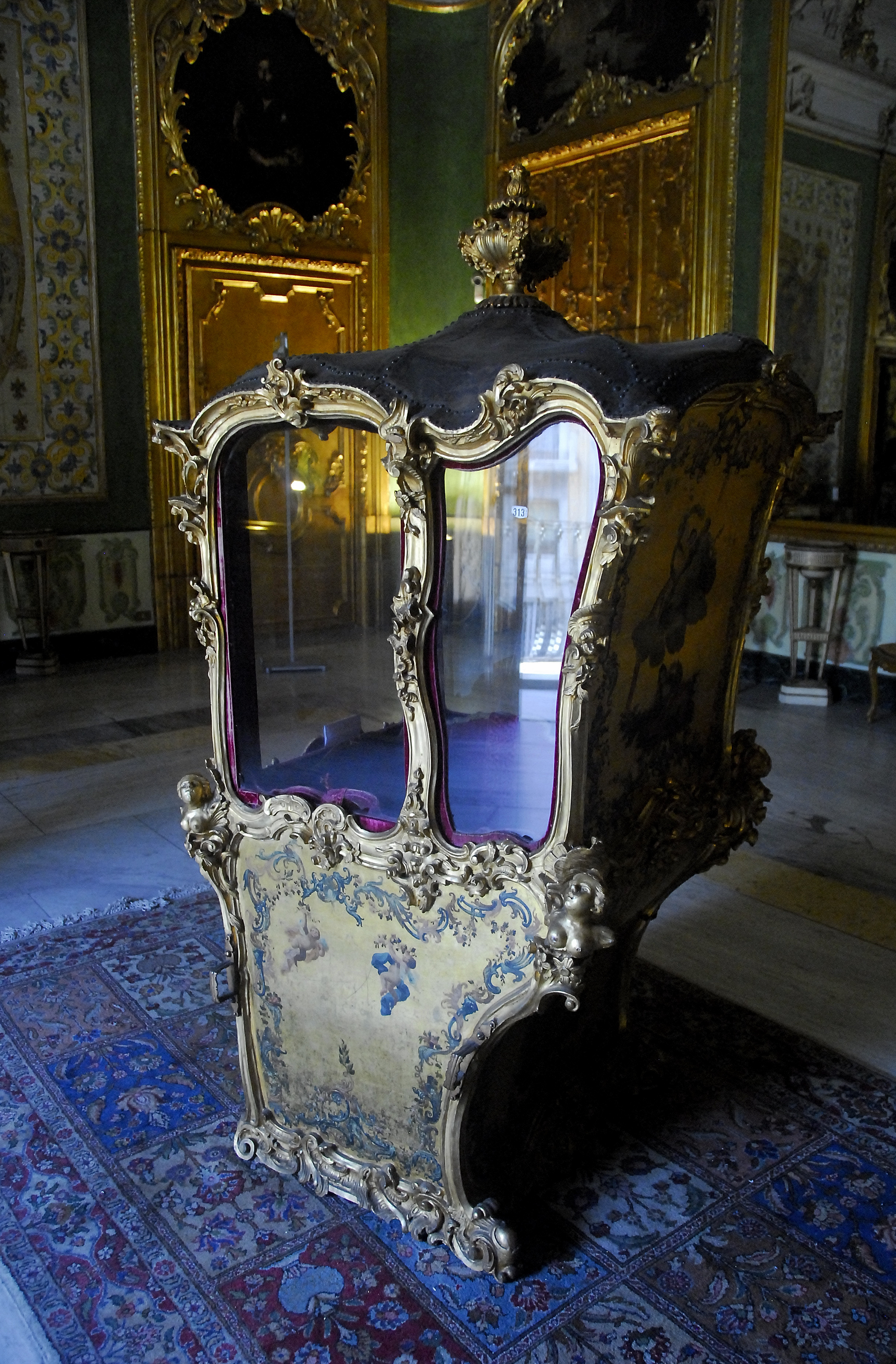 Palermo, ITA